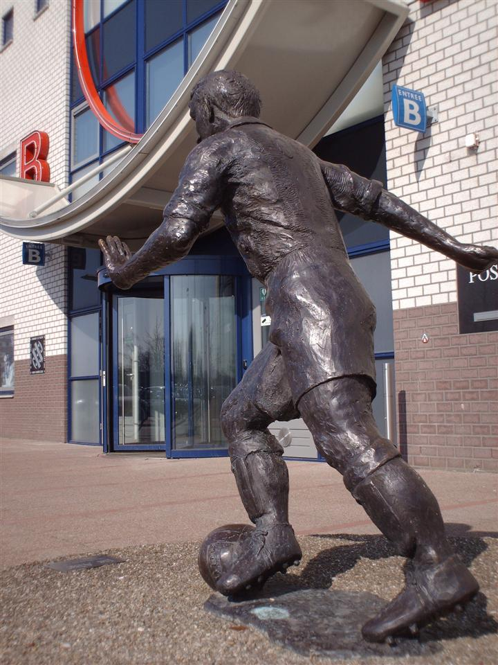 Standbeeld Abe Lenstra (1994) bij het stadion in Heerenveen, by Frans Ram